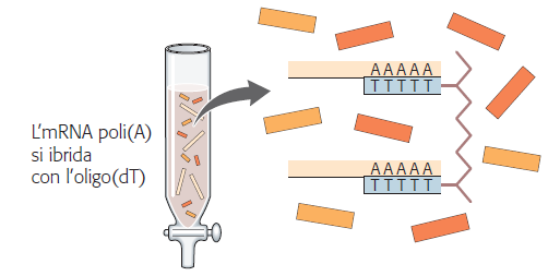 processo di isolamento